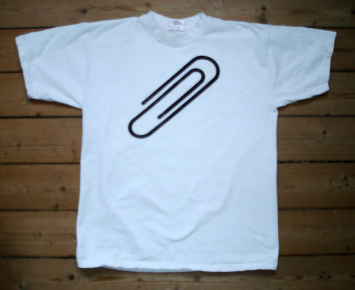 Paper-clip T-shirt, Any del disseny, Barcelona 2003